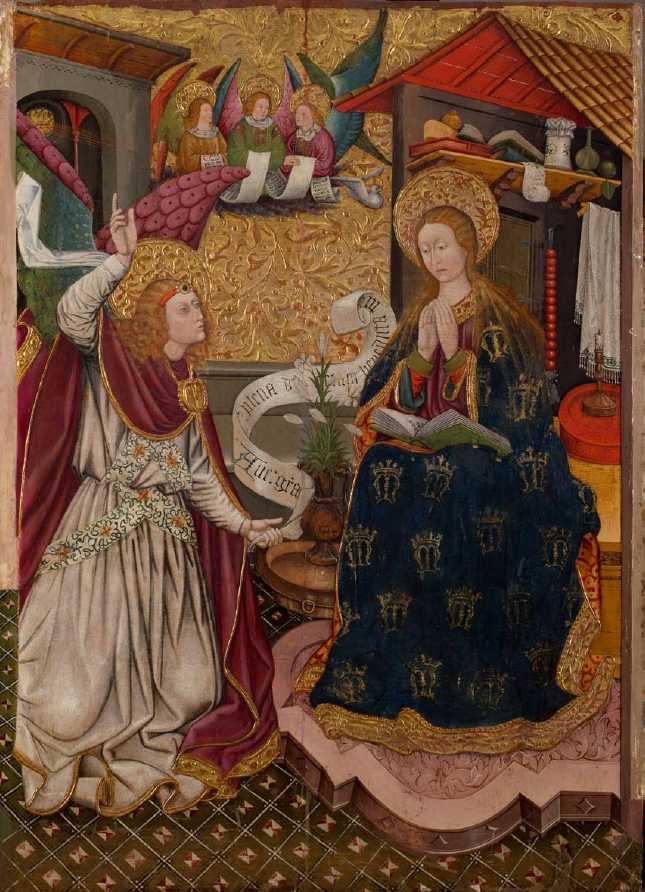 Taula de l'anunciació del retaule de Peralta de la Sal, obra de Pere Garcia de Benavarri i Jaume Ferrer II. 1450